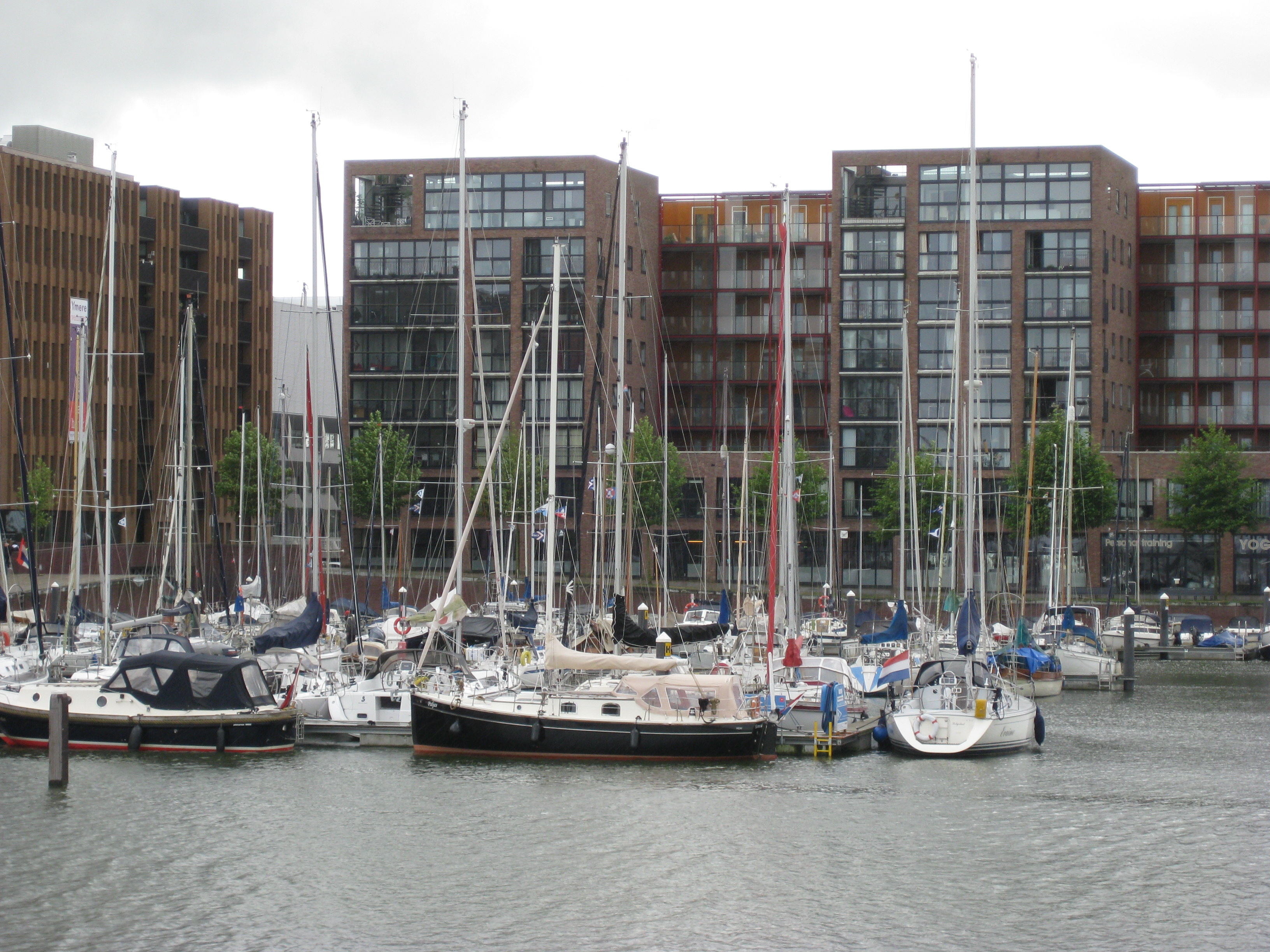 Haventje van IJburg Amsterdam